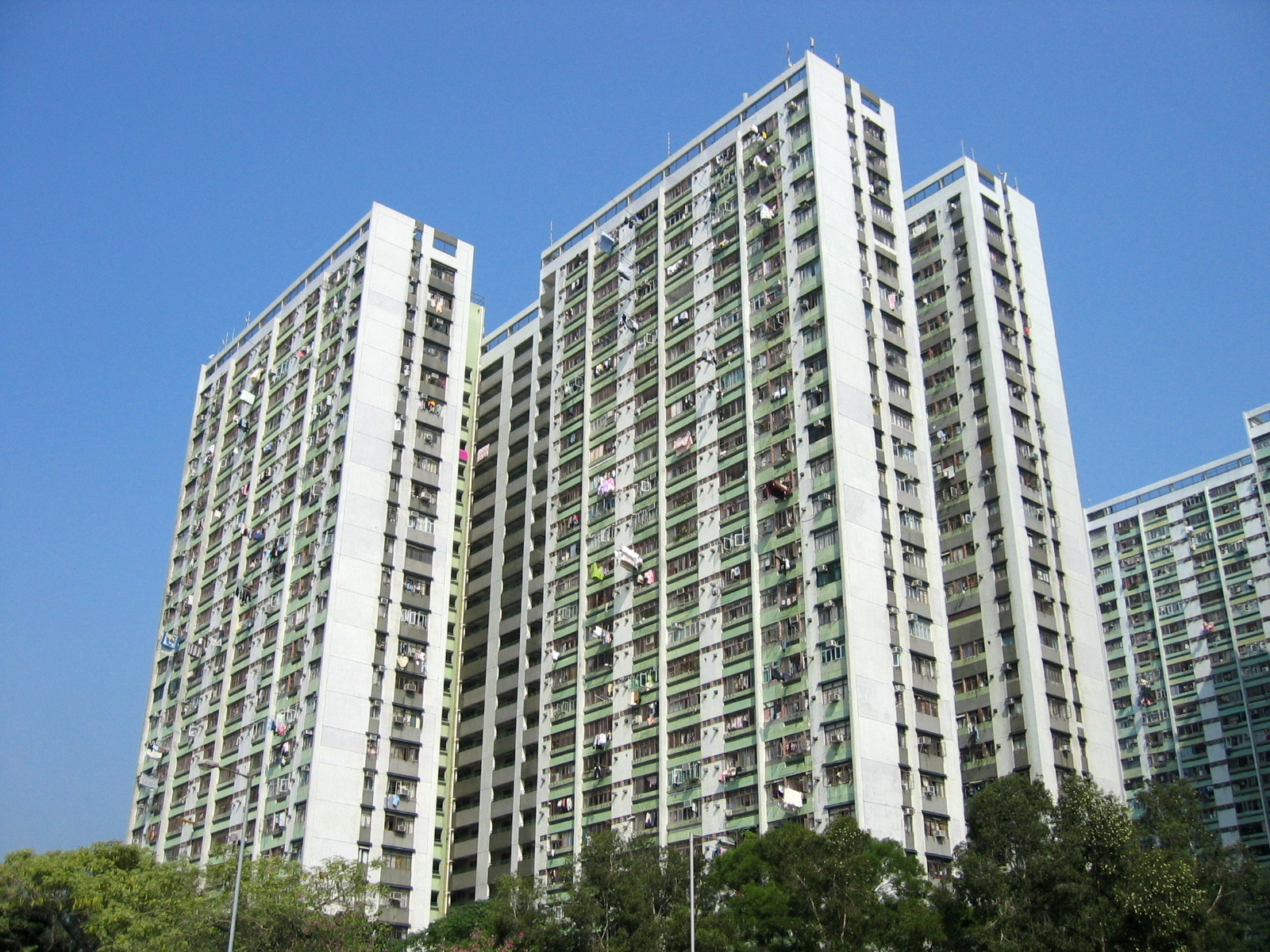 Sun Chui Estate H Block